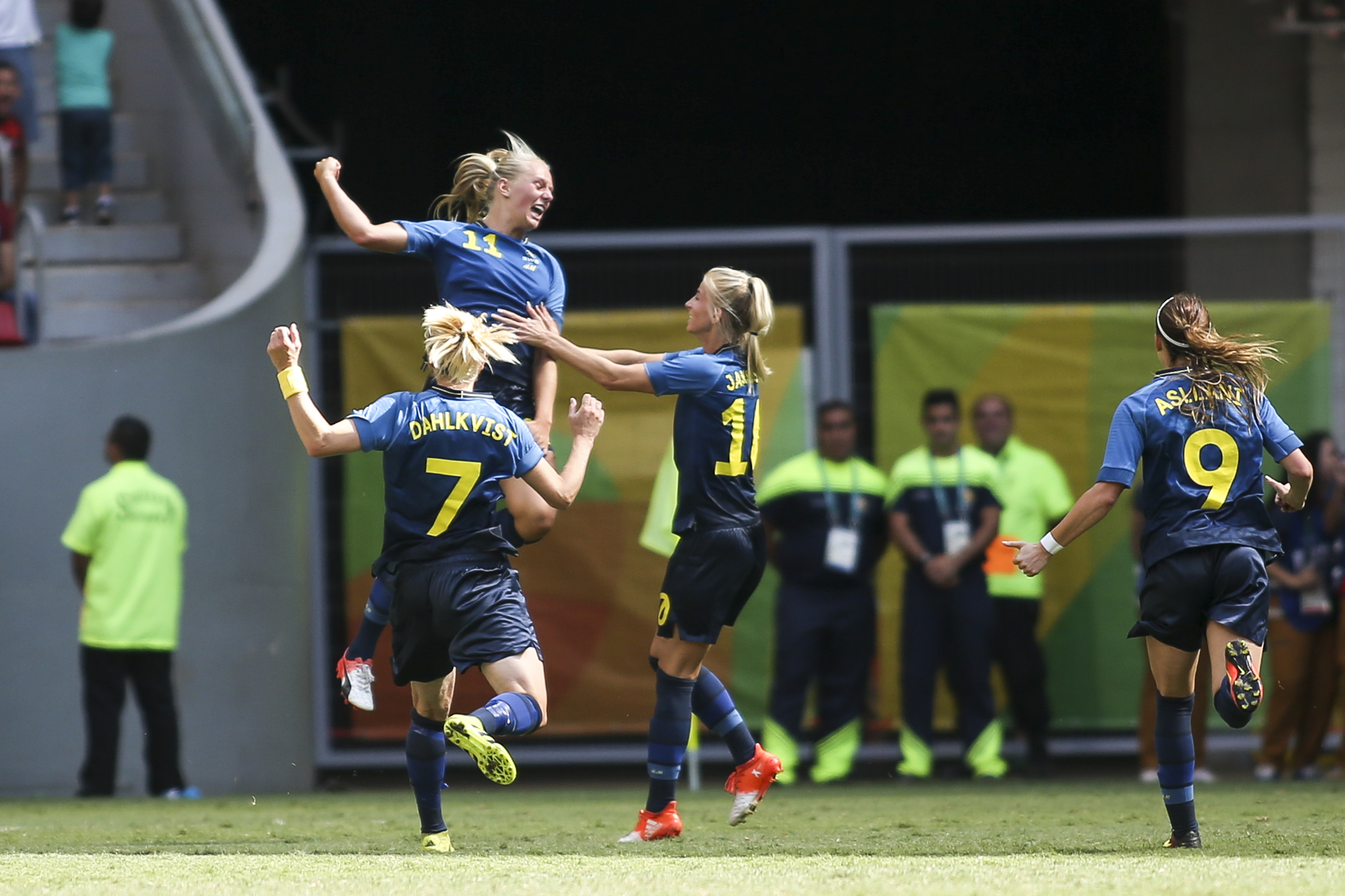 Brasília - A seleção dos Estados Unidos enfrenta a seleção da Suécia pelas quartas de final do futebol feminino, no estádio Mané Garrincha (Marcelo Camargo/Agência Brasil)